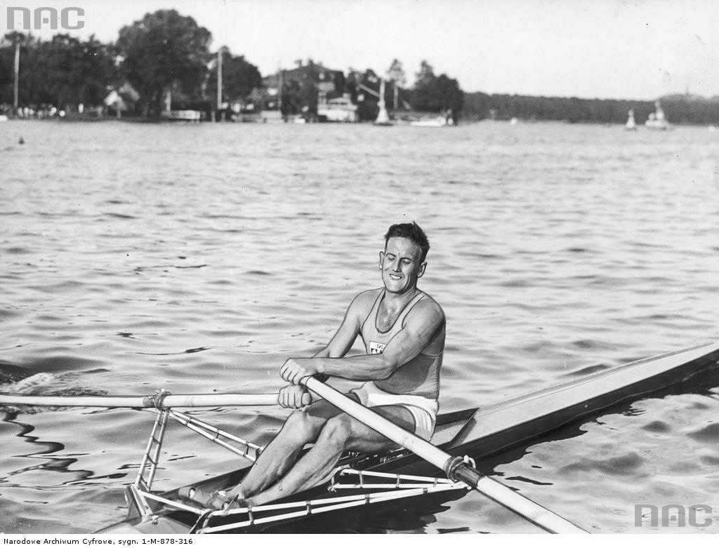 Roger Verey podczas Letnich Igrzysk Olimpijskich w Berlinie w 1936 roku